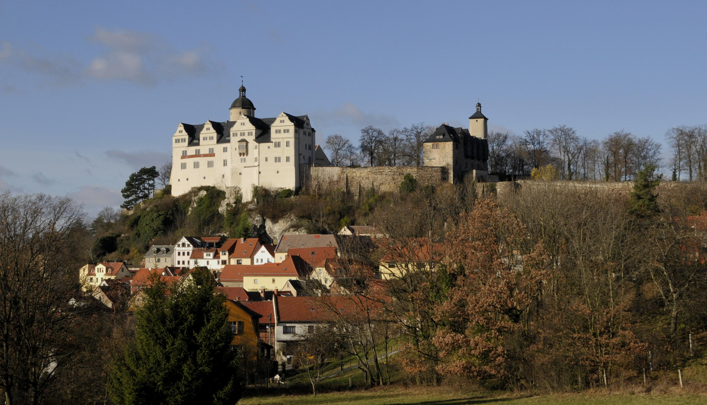 Burg Ranis